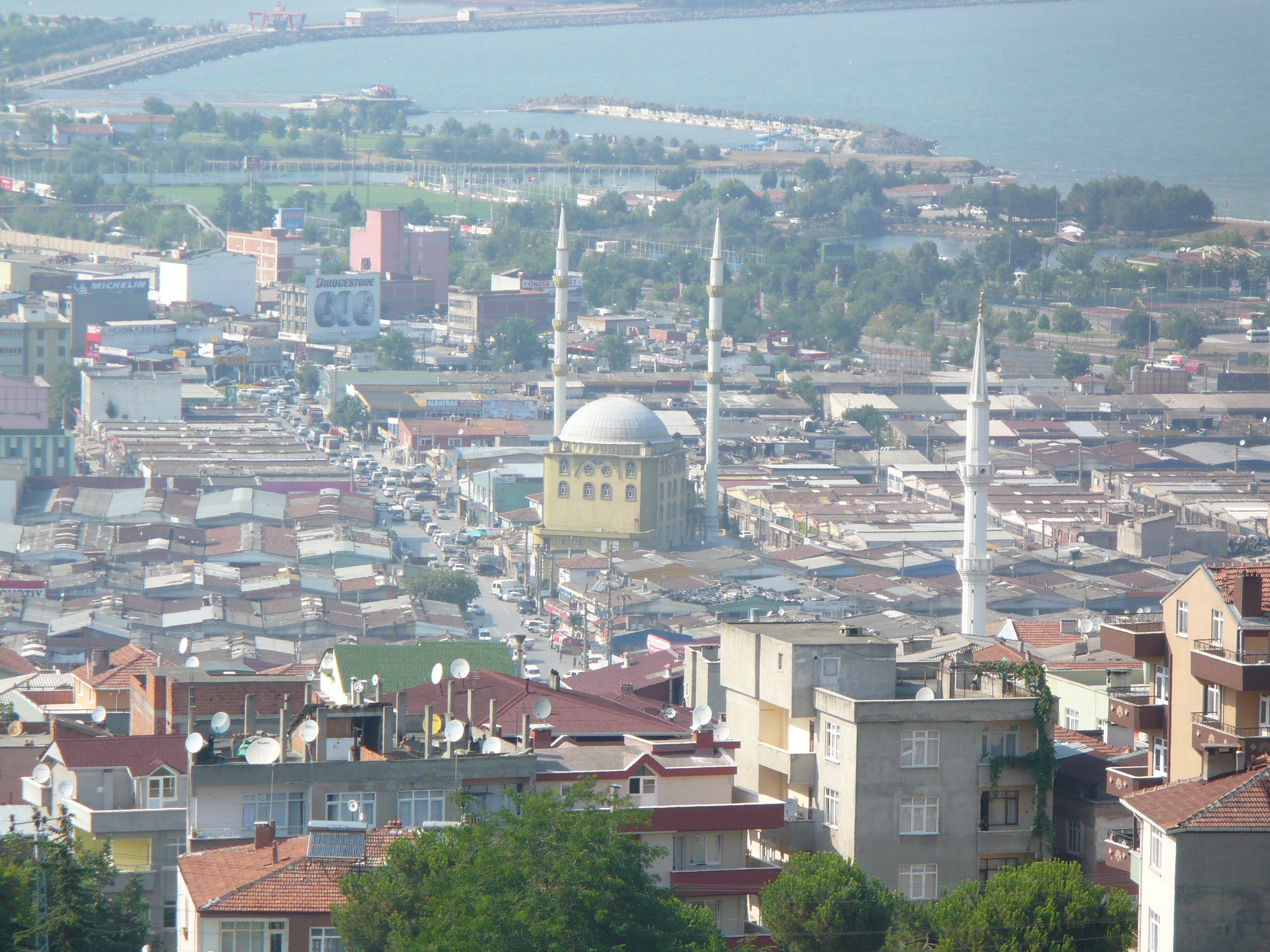 Samsun'dan çeşitli görüntüler